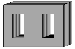 Schéma de la carcasse d'un transformateur monophasé bas de gamme. Dessin personnel réalisé pour l'article transformateur électrique de yohann de olivera